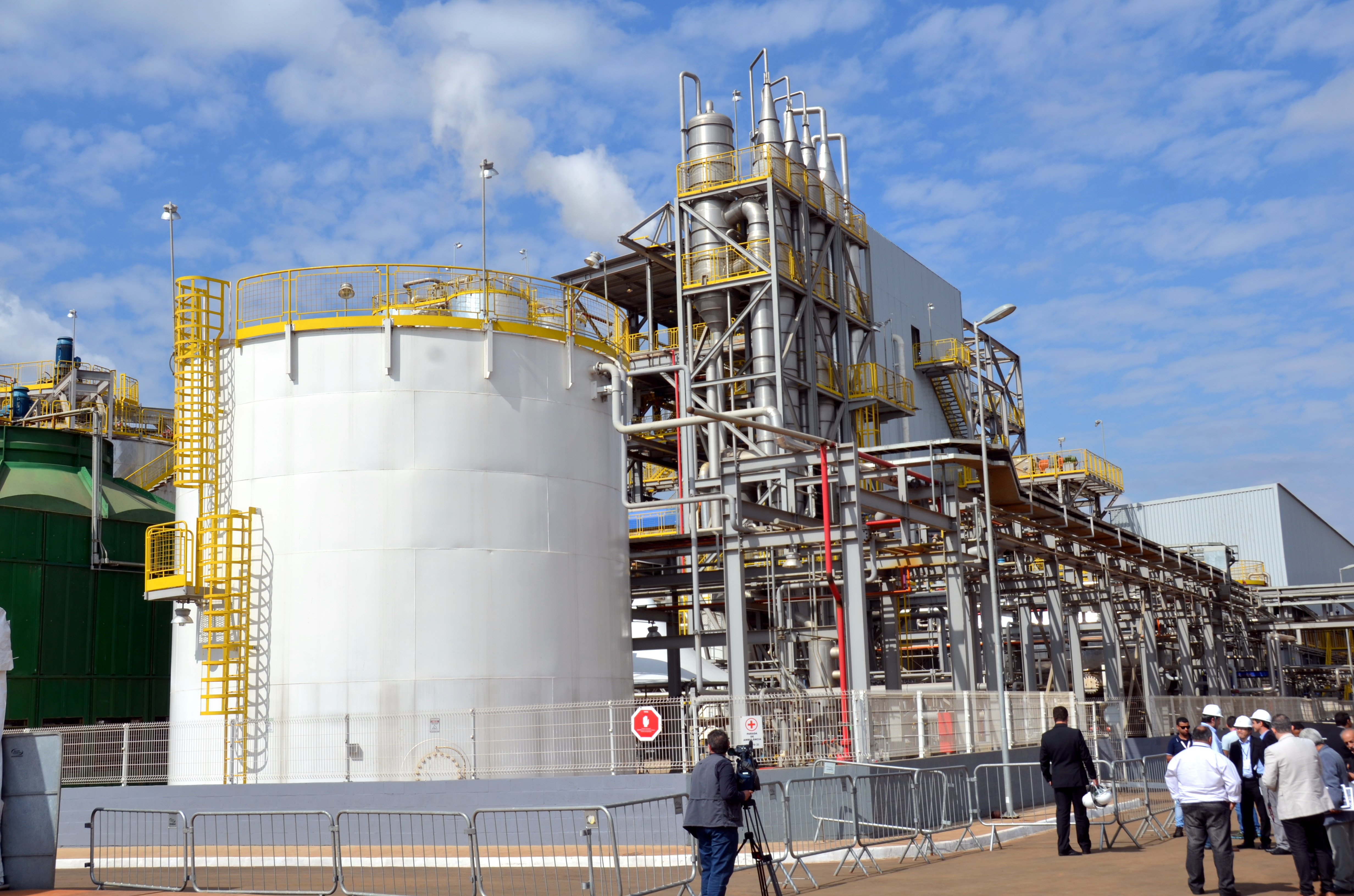 INAUGURAÇÃO PLANTA DE ETANOL DE SEGUNDA GERAÇÃO - RAÍZEN - PIRACICABA 22/07/2015